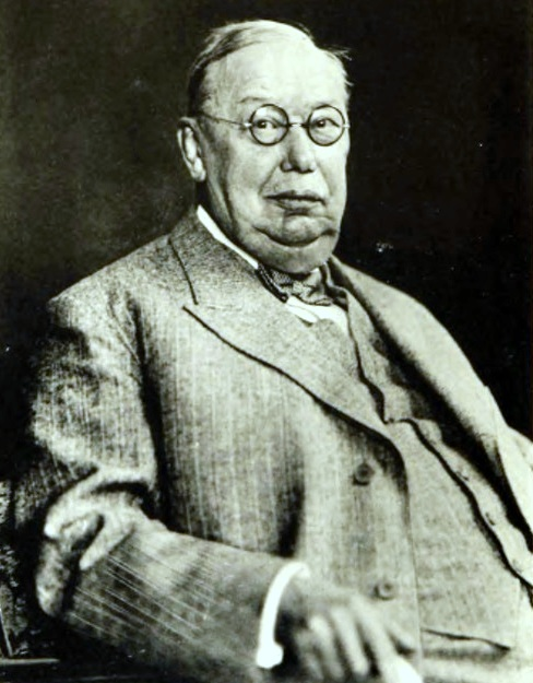 Ehrensenator der RWTH Aachen Fritz Wüst